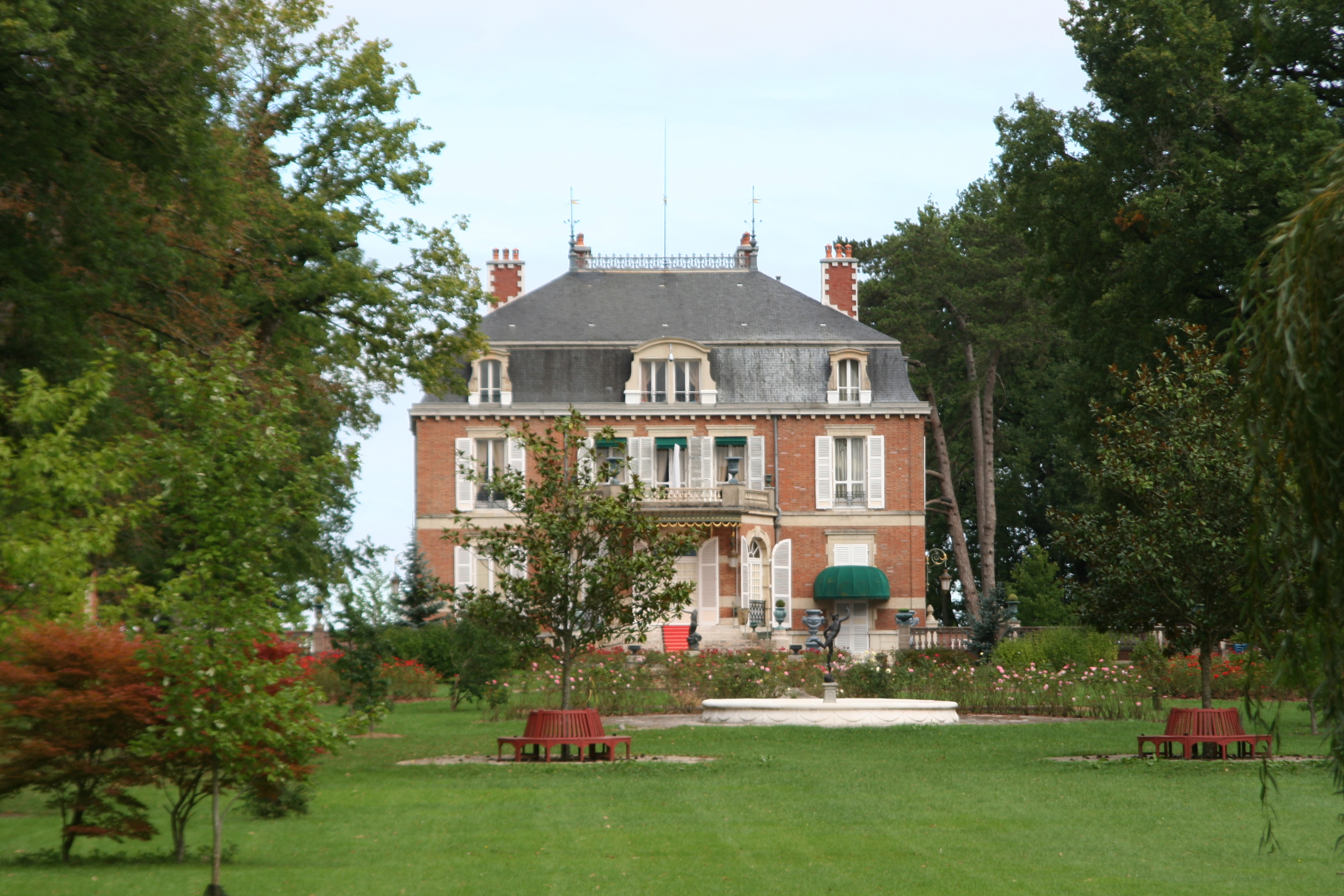 Château de Terrangeot, westlich der Stadt auf der Hauptstrasse nach Châlon-sur-Saône